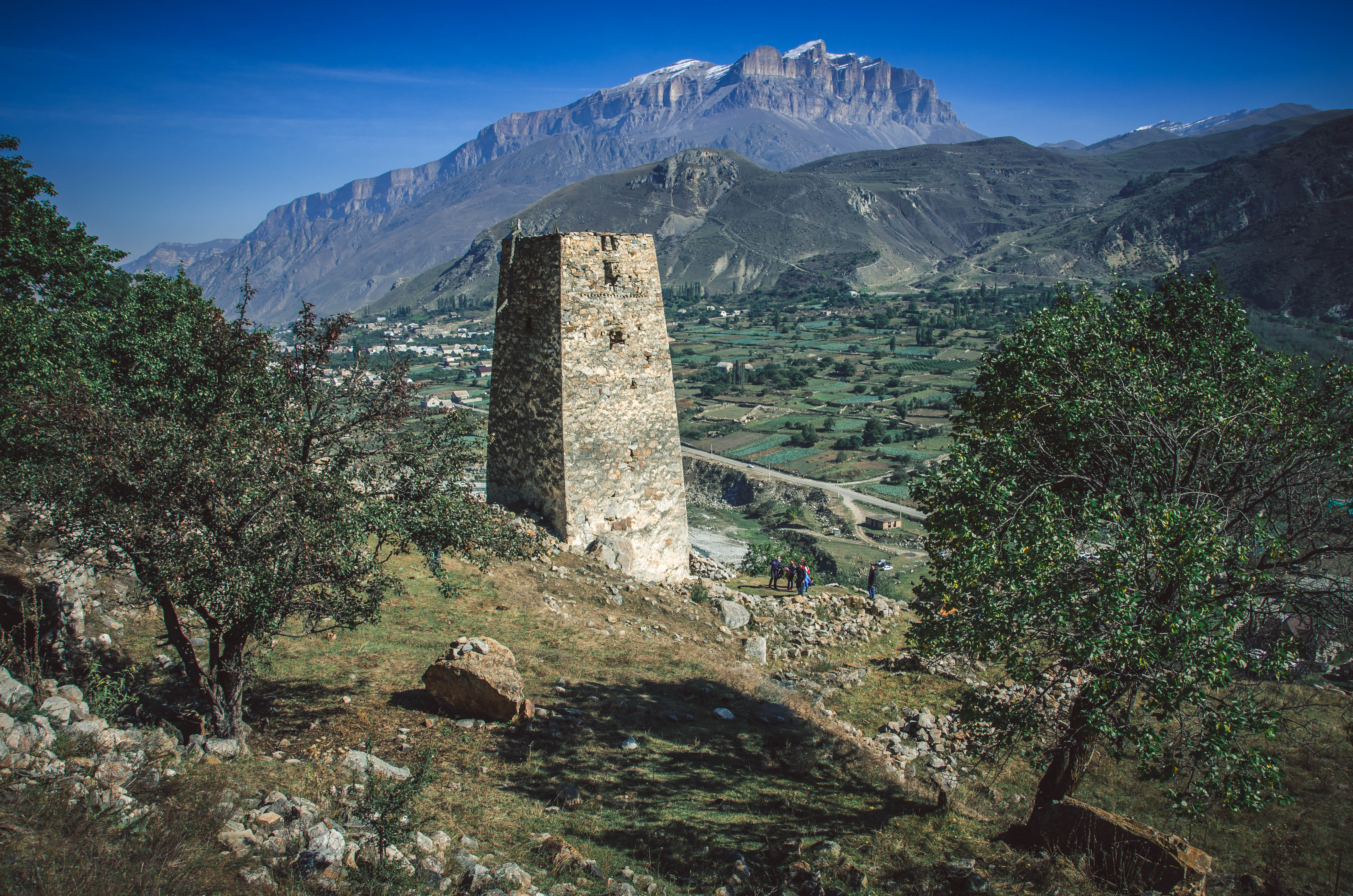 Черек-Балкарская теснина: В ущелье одноименной реки ниже с. Верхняя Балкария,Верхняя Балкария,Черекский район, Кабардино-Балкария This image is related to the protected area of Russia number 0710036